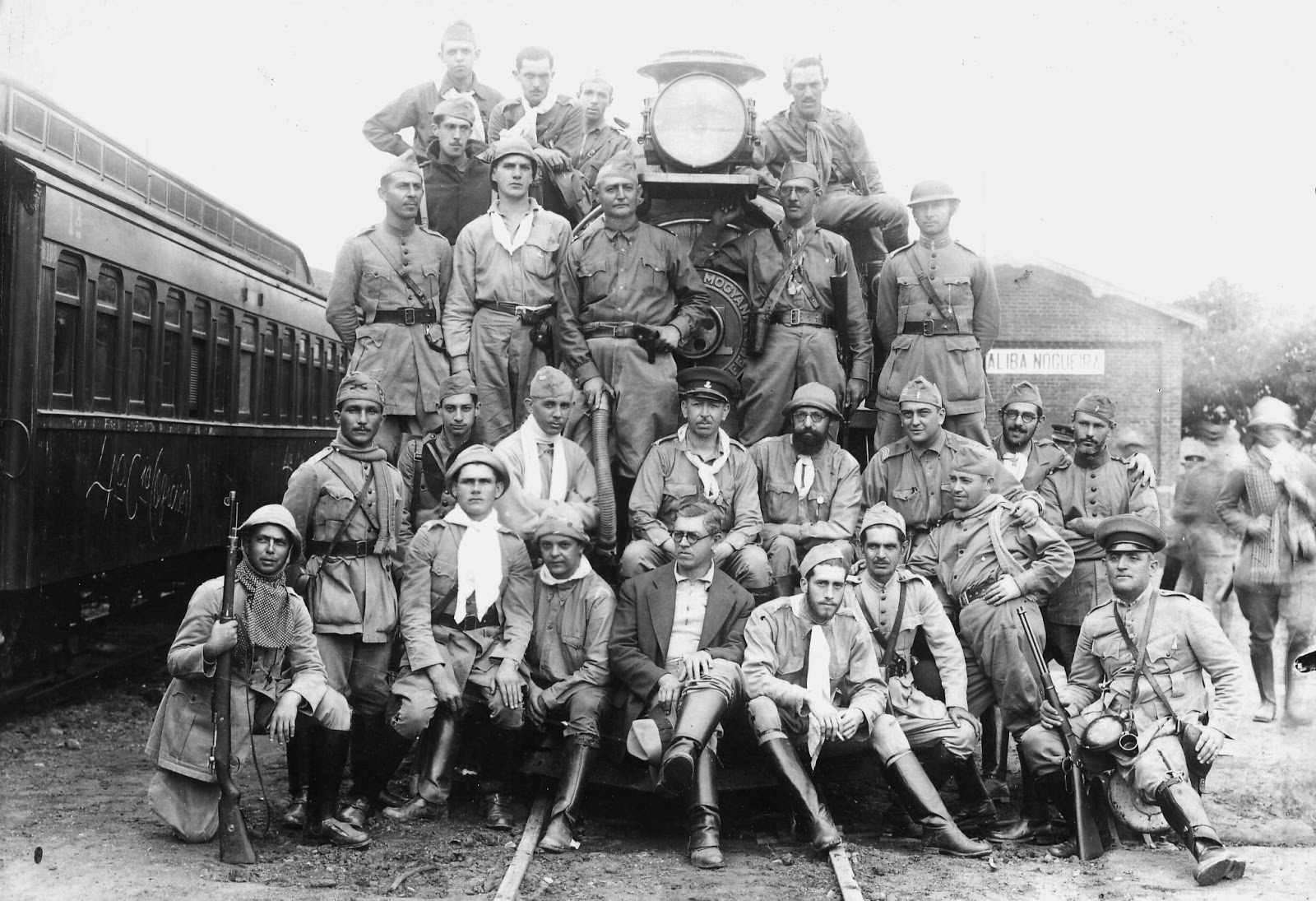 Voluntários e oficiais das tropas paulistas na Estação Ferroviária de Barão Ataliba Nogueira, distrito de Itapira-SP, durante a Revolução de 1932. Ao centro da imagem (de óculos, sentado e segurando chapéu), o coronel Francisco "Chico" Vieira, comandante do Esquadrão de Cavalaria "Chico Vieira". Também ao centro da imagem (sentado na segunda fila), o capitão da Força Pública de São Paulo (atual PMESP) Antônio Piestcher, comandante do Batalhão Paes Leme.